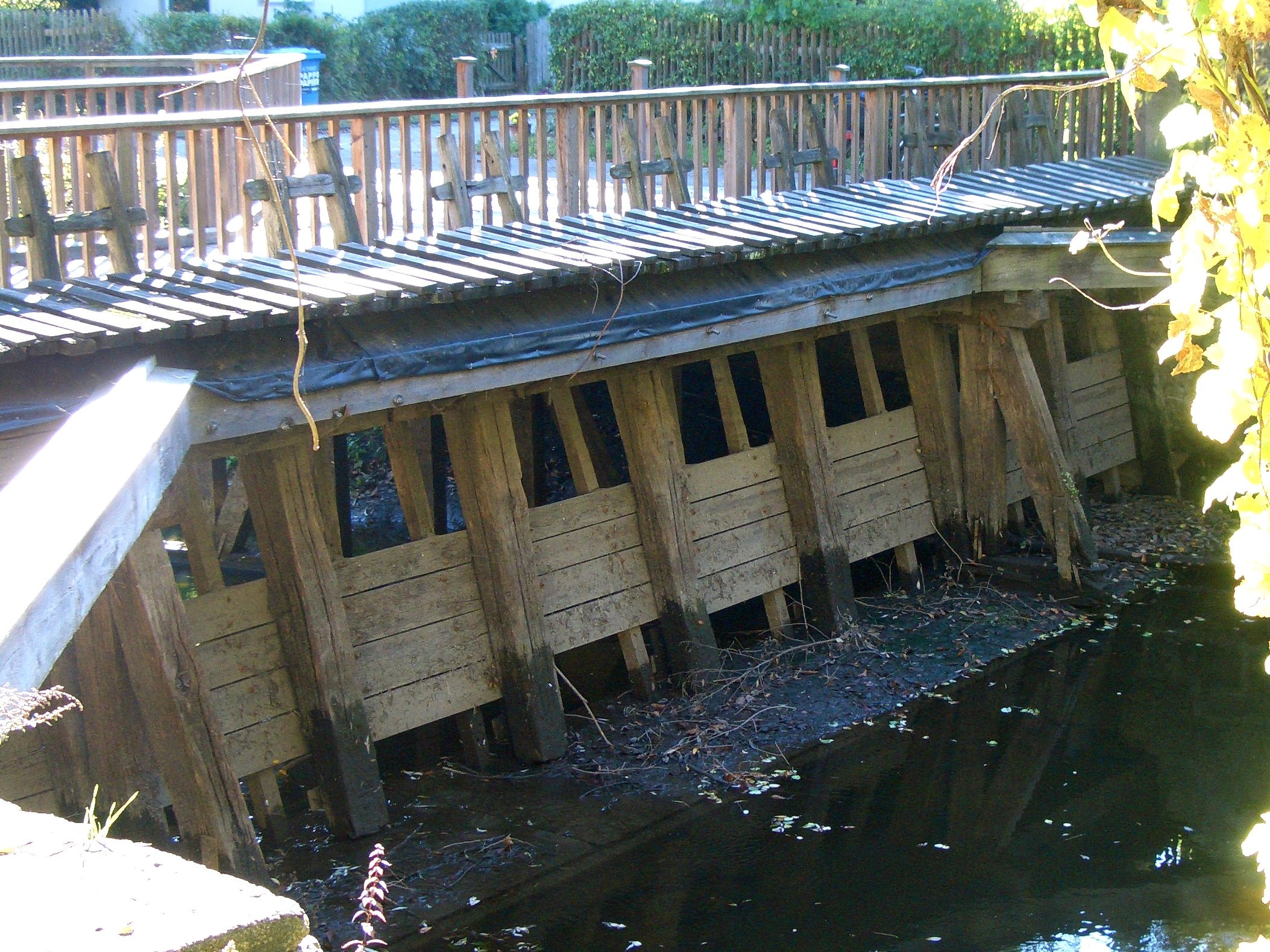 Historisches Mühlenwehr an der ehemaligen Ölper Mühle